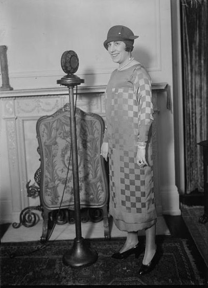 Lucrezia Bori (1887 – 1960), Spanish operatic singer, soprano